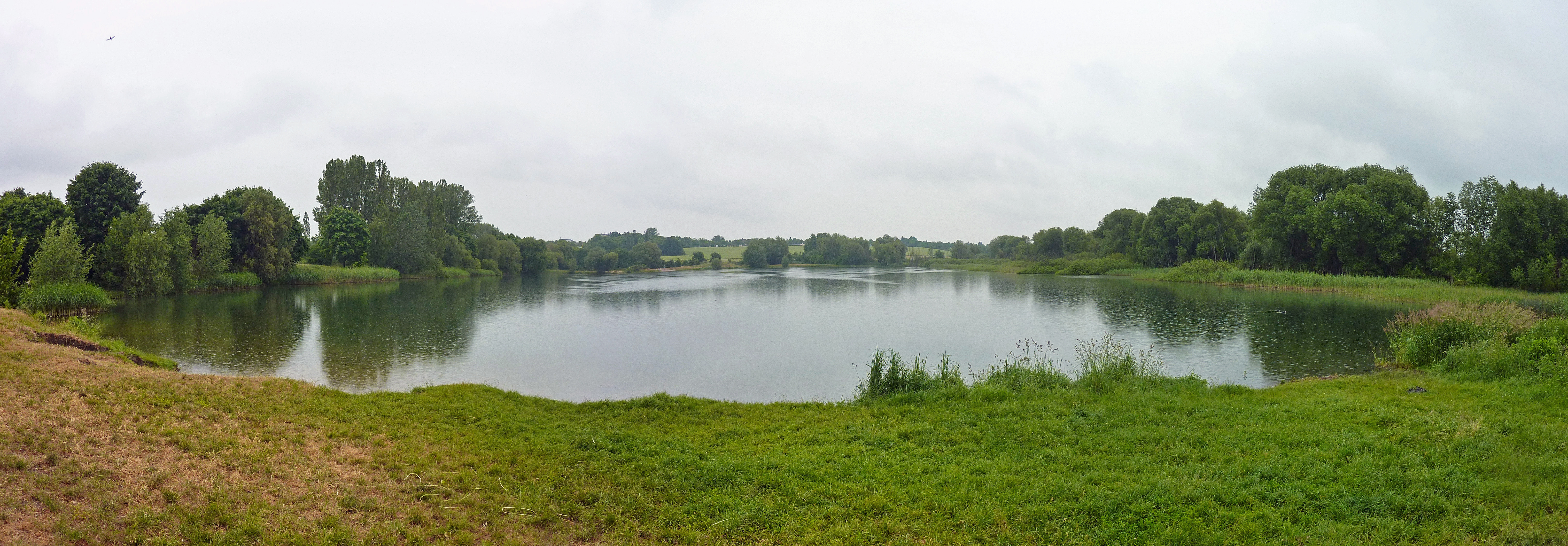 Butzer See in Berlin-Kaulsdorf